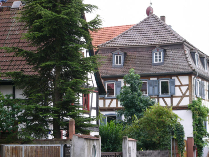 Altheim